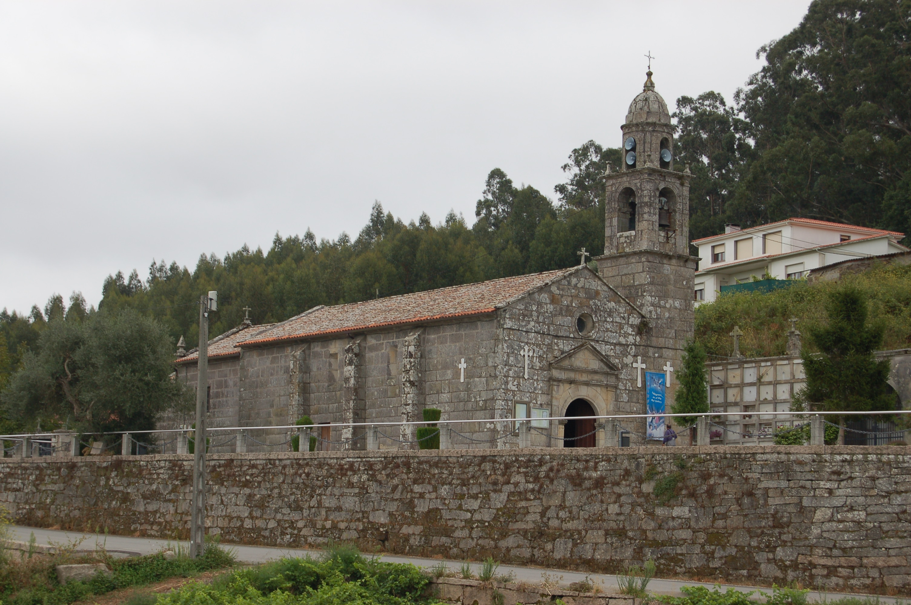 Igrexa parroquial de Vilalonga (Sanxenxo)